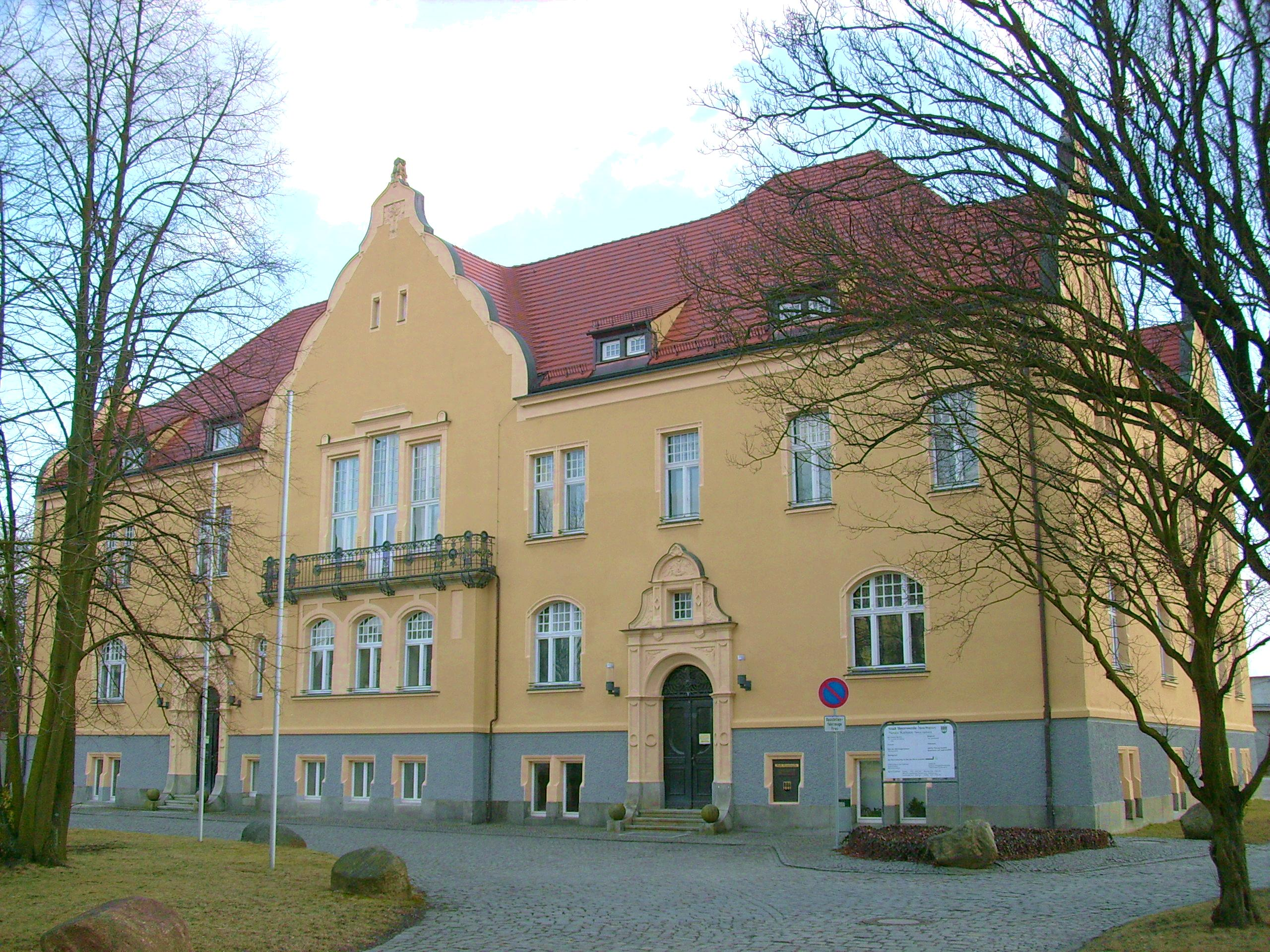 Neues Rathaus, Salomon-Gottlob-Frentzel-Straße 1 in Hoyerswerda